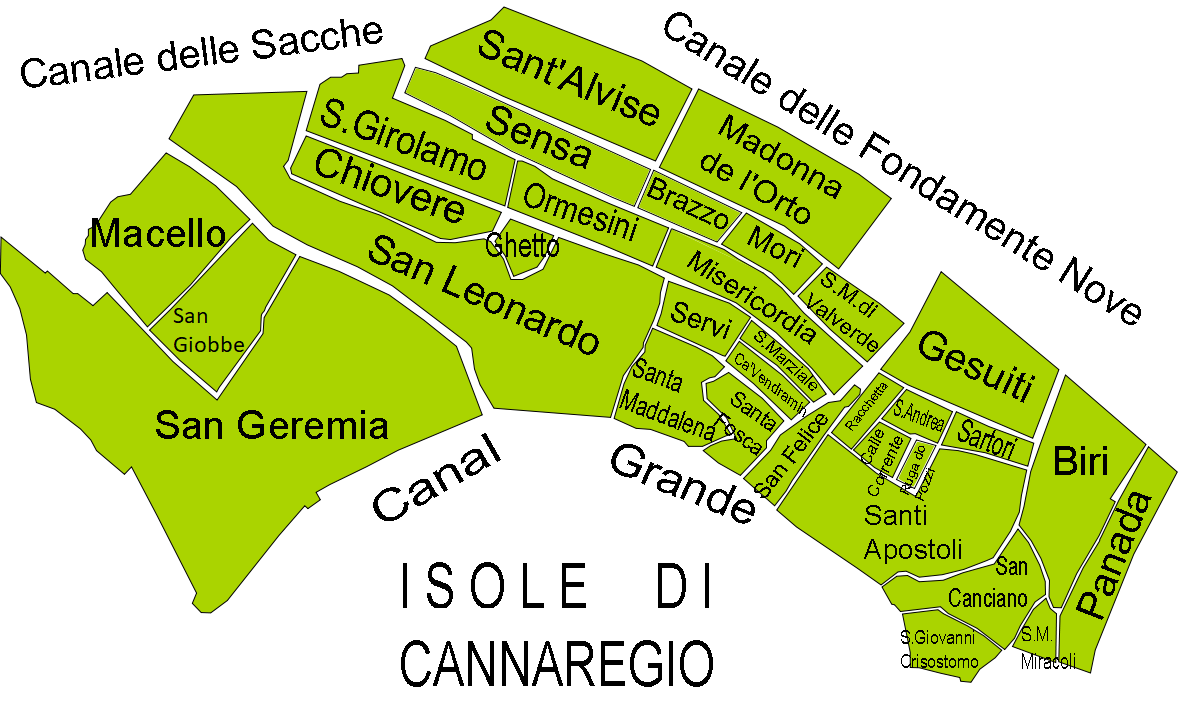 plan des iles du sestiere de cannaregio venise